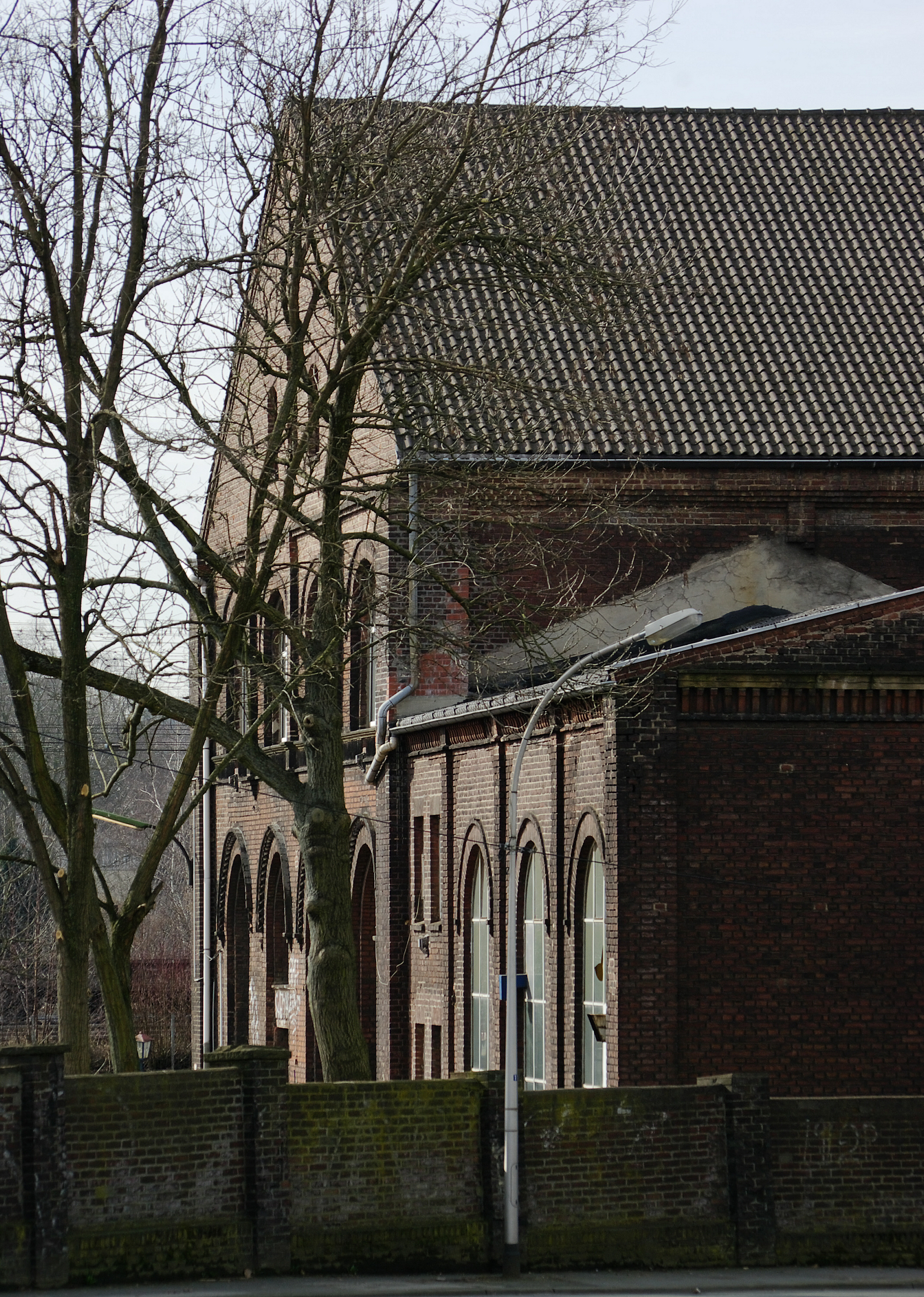 Weichenwerk Witten der DB Netz, Blick auf die ehemalige Lehrwerkstatt, ursprünglich Centralmagazin und bis zum Abriss 2015 ältestes erhaltenes Gebäude des Weichenwerks